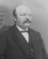 Albertus van Naamen van Eemnes (1828-1902)